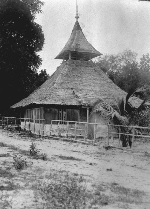 Foto. ekspedisi militer ke Irian barat 1907-1915. Bangunan berasitektur tradisional di Kep. Tanimbar